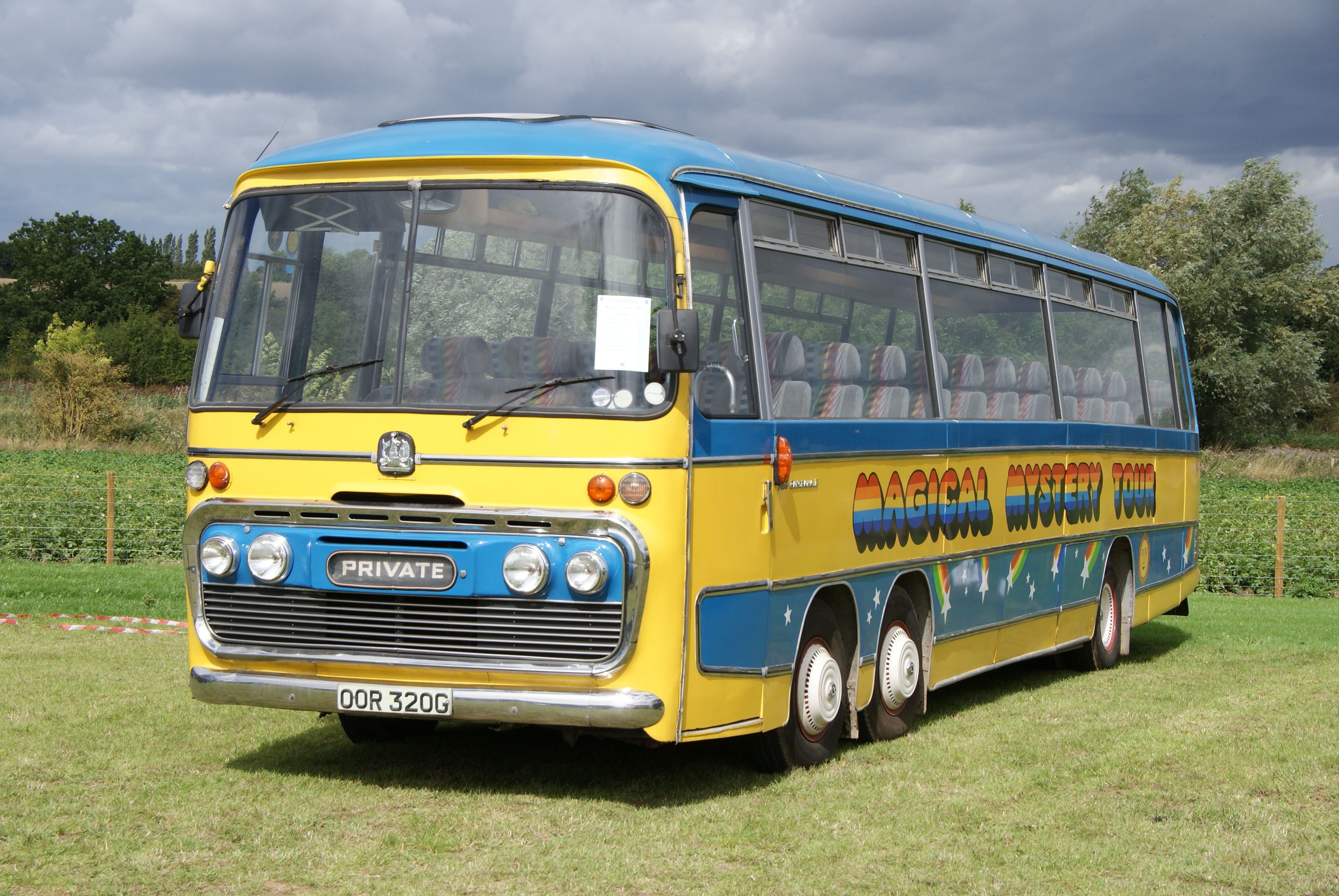 OOR320G-3 290810 CPS